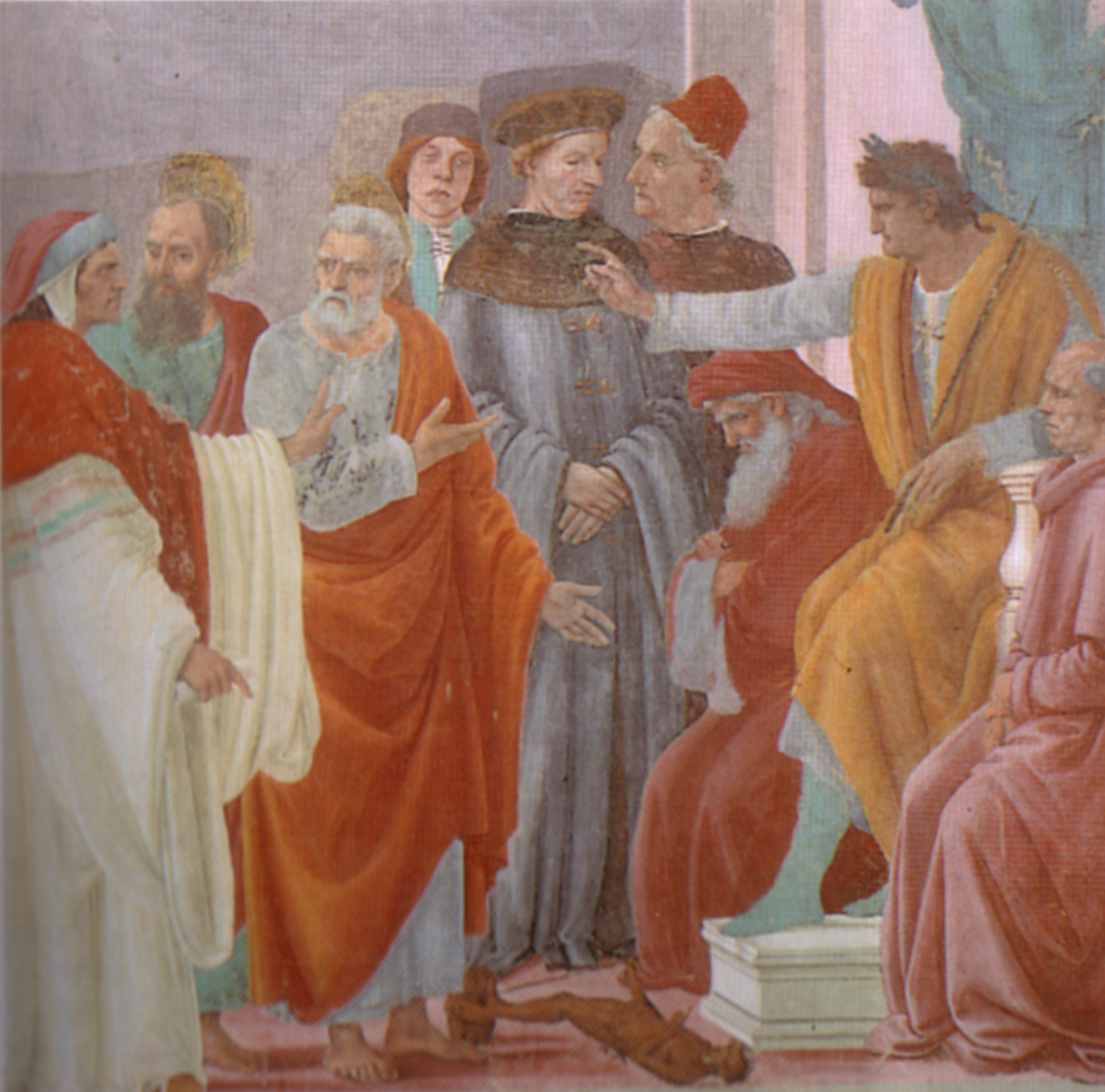 Cappella brancacci, Disputa di Simon Mago (restaurato), Filippino Lippi